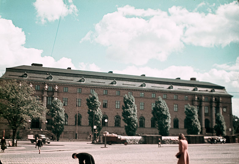 Gamla posthuset Motiv: Göteborg Nyckelord: Riksintressen Kategori: Stadsmiljö, Posthus/poststationGamla posthuset.